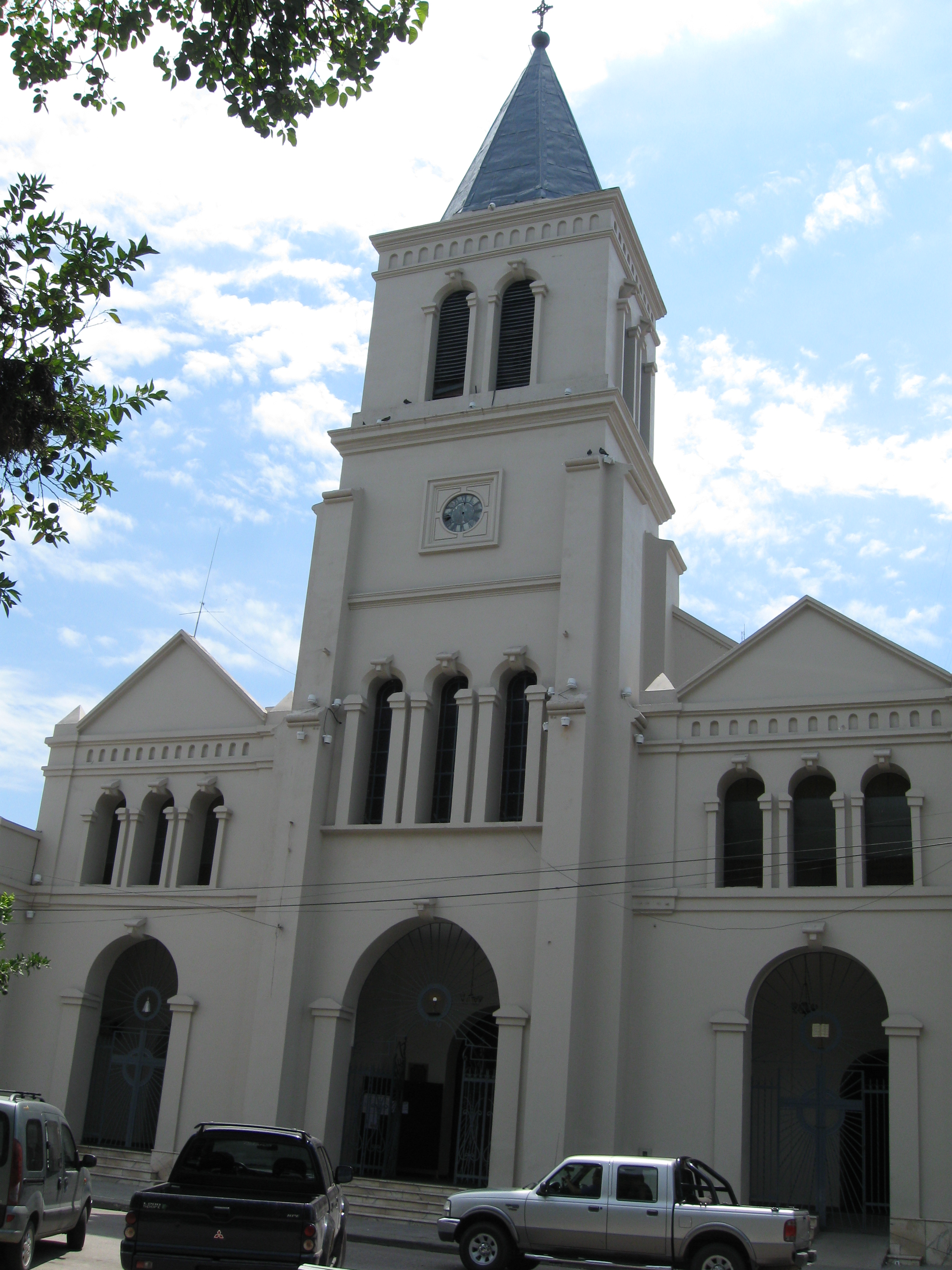 Concepcion de Tucuman Catedral